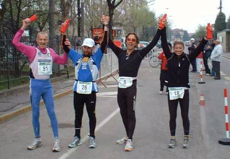 24 ore del Delfino - Primi tre Classificati (da Sx Pirotta, Garello, Barnes. Ultima dx Virginia Oliveri)